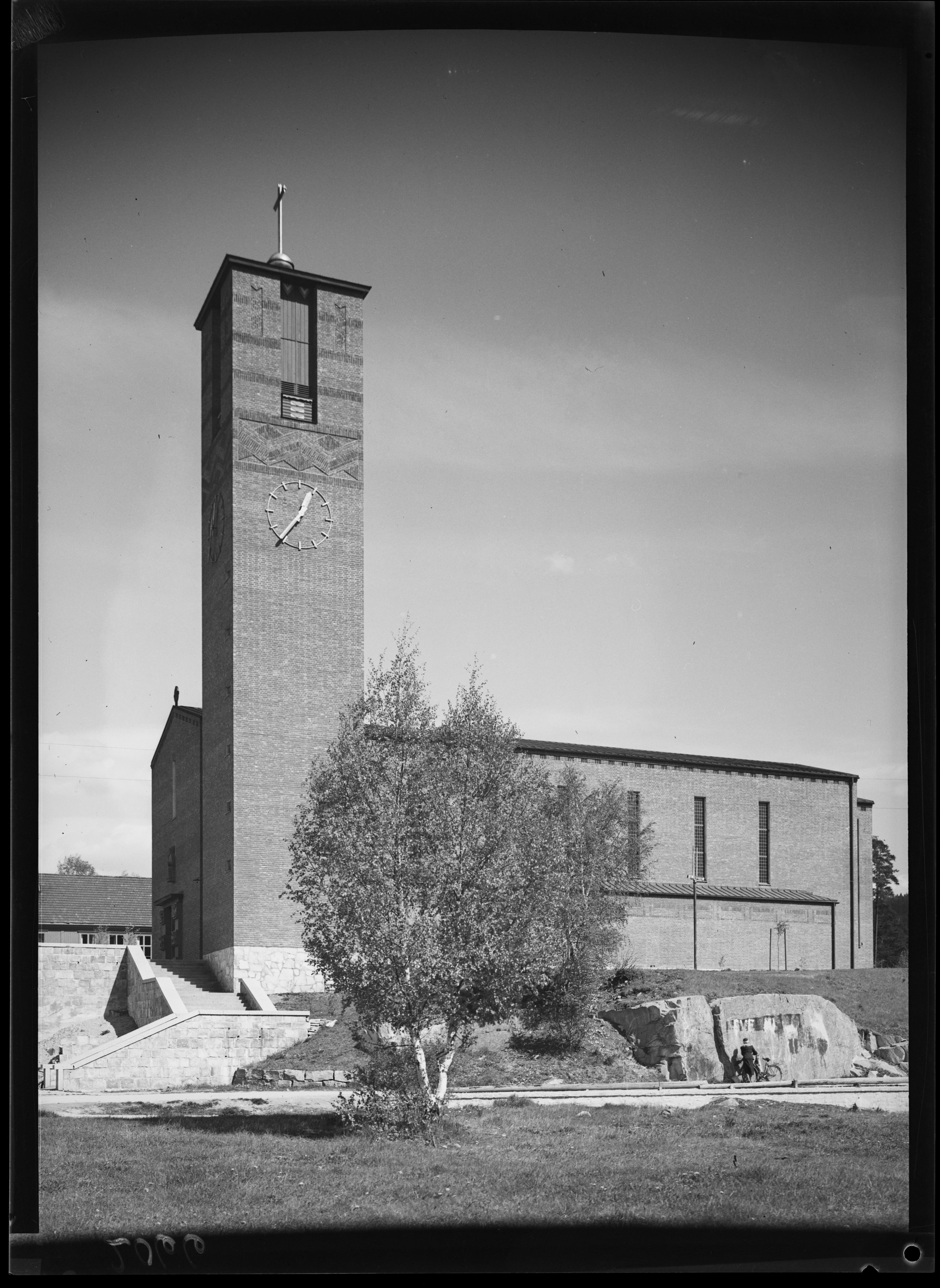 Bildet er hentet fra Nasjonalbibliotekets bildesamling. Anmerkninger til bildet var: Fotograf:Ukjent Notodden, Notodden, Telemark